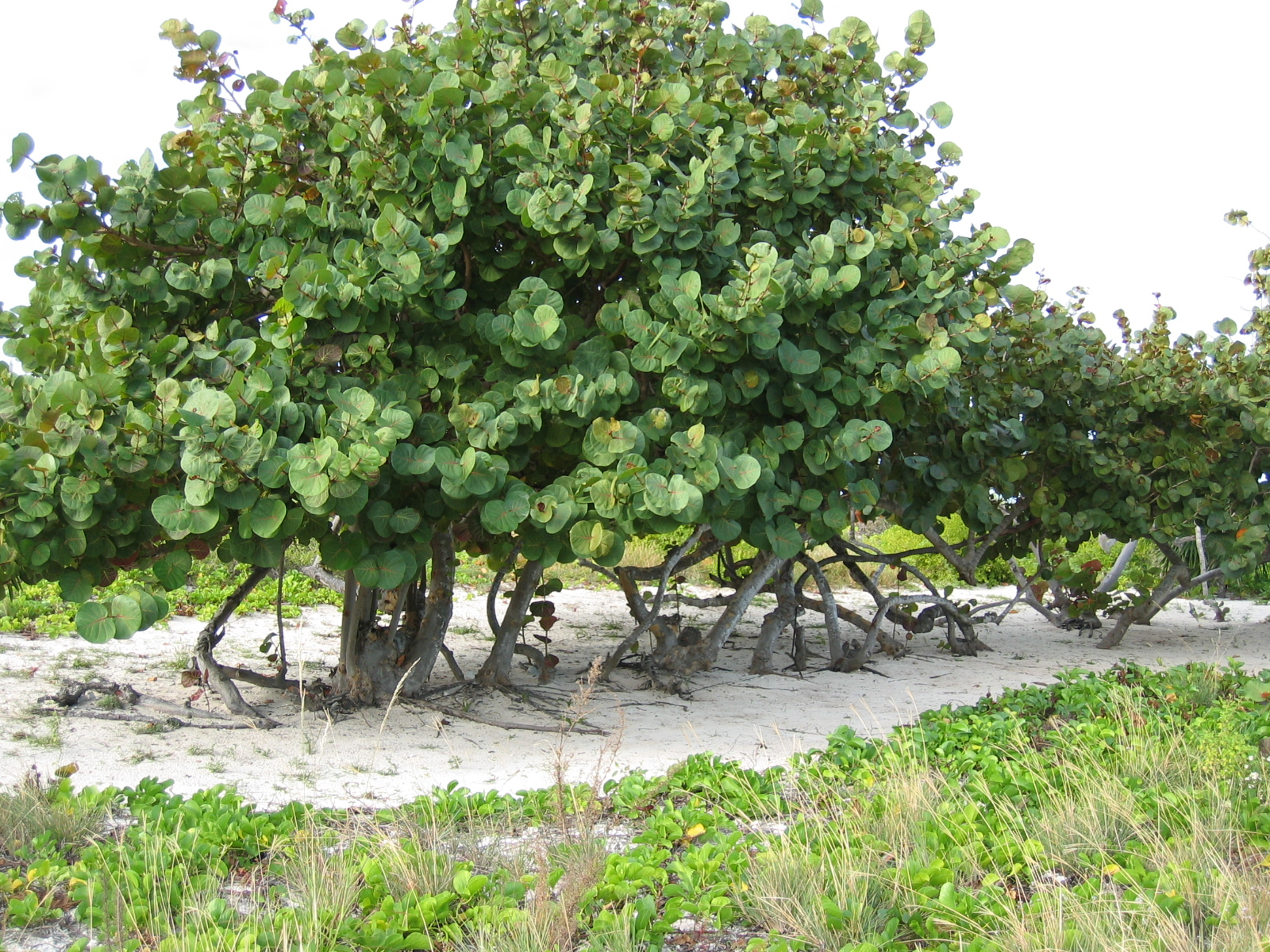 Strandtraube (Coccoloba uvifera), Cuba